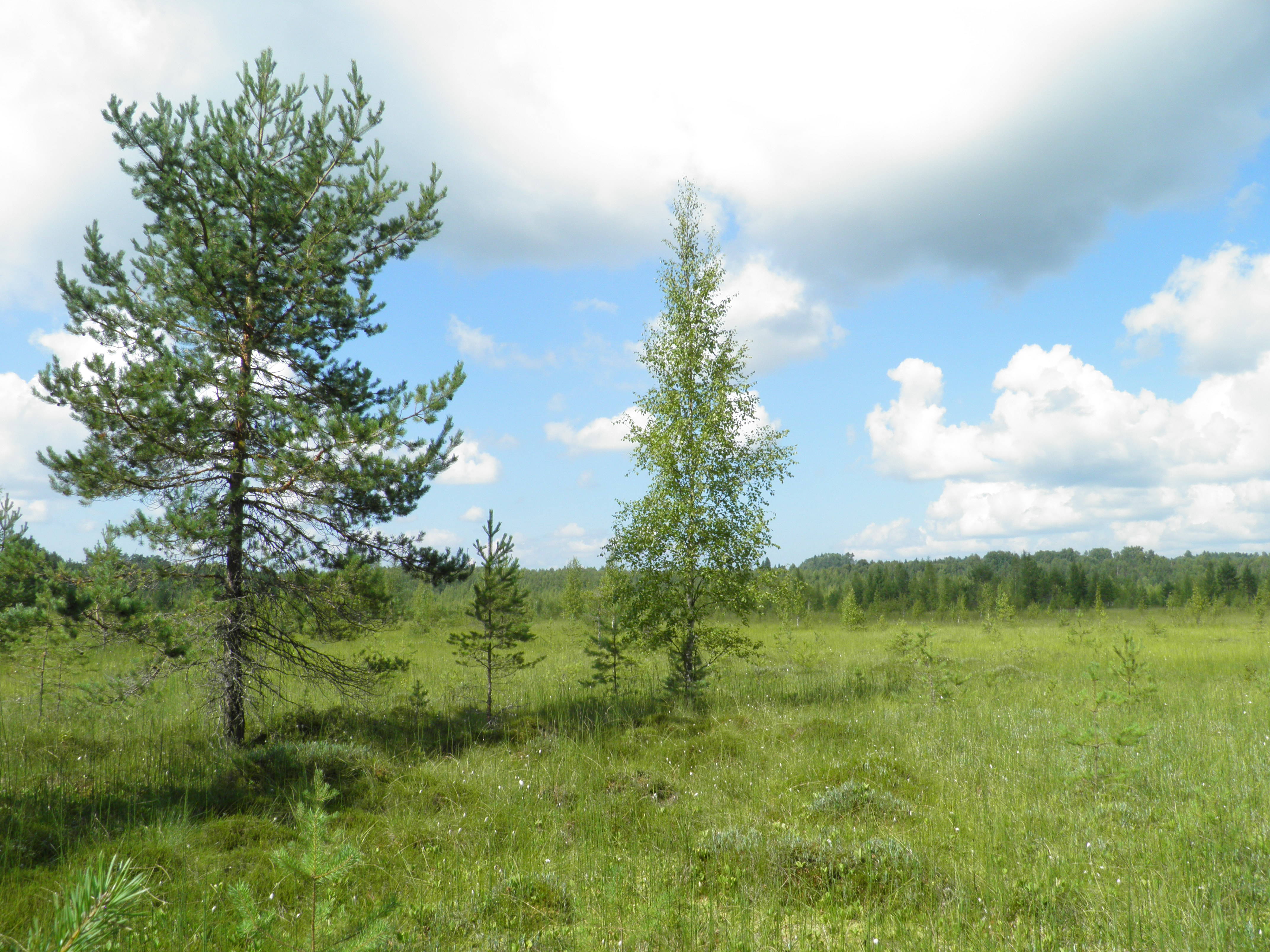 Lamminjärvensuota etelästä nähtynä Hämeenlinnan Lammilla.